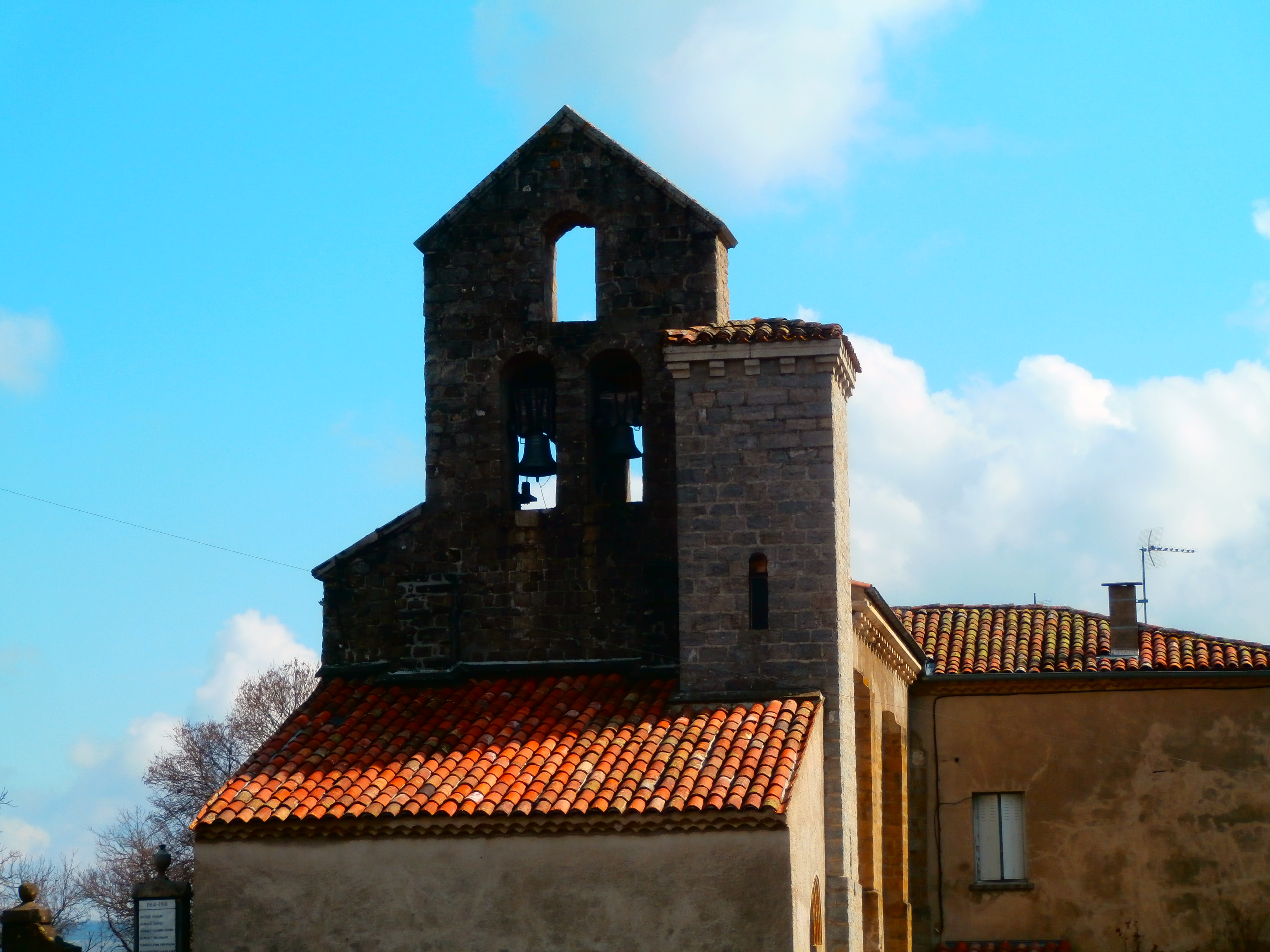 Office de Tourisme - Foix Ariège Pyrénées